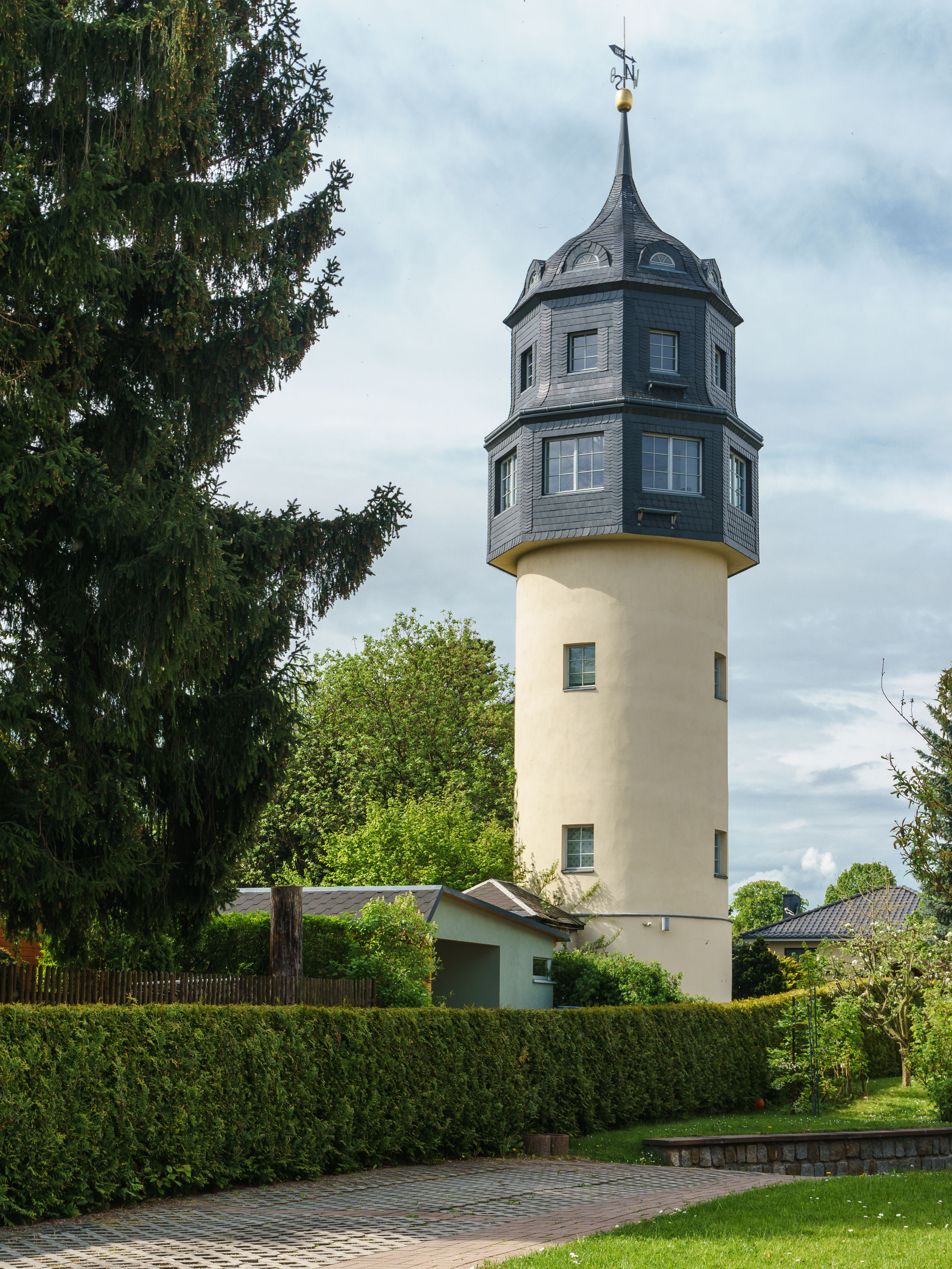 Wasserturm, Am Wasserturm in Niederwiesa OT Braunsdorf